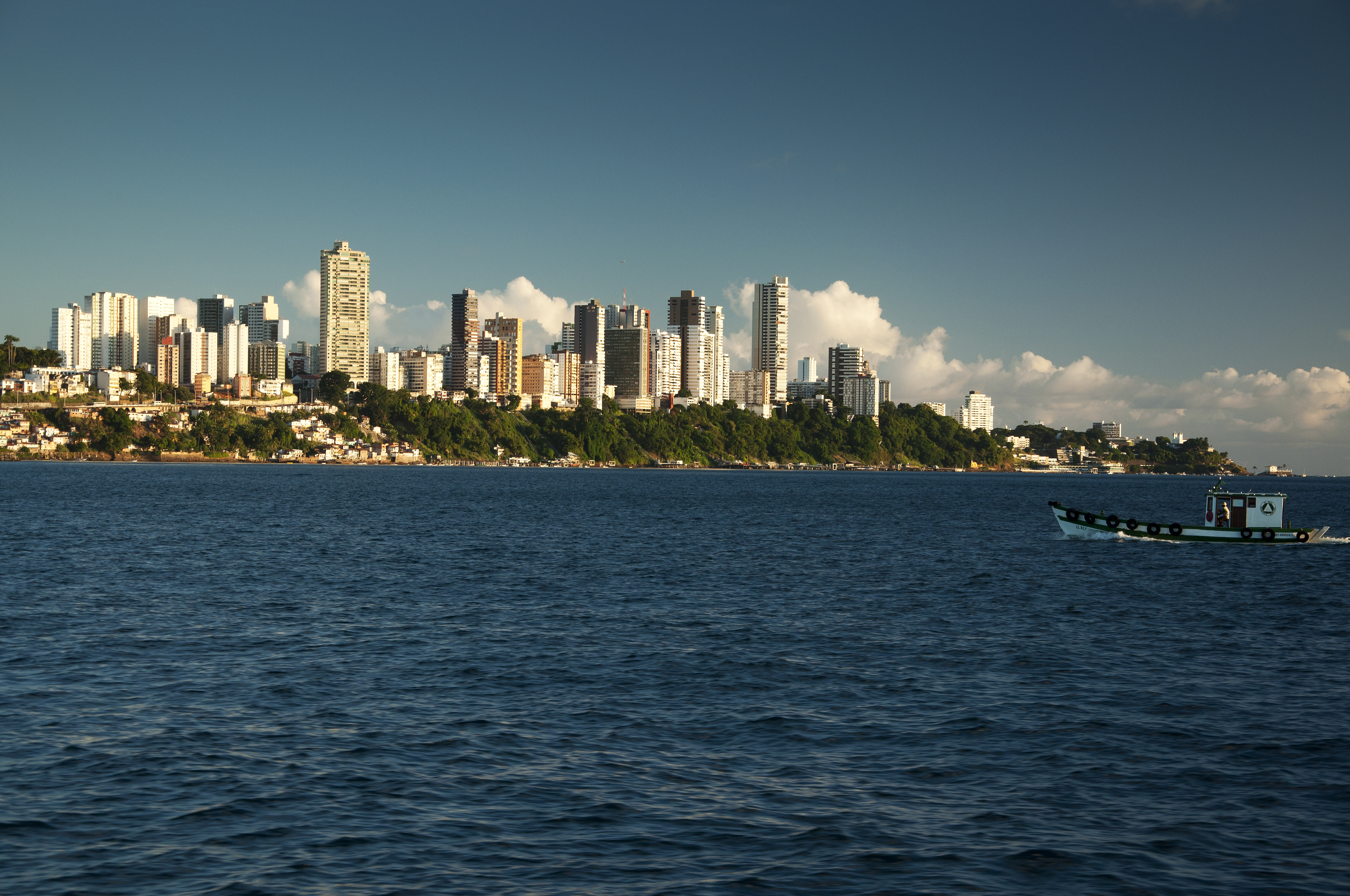 Salvador, Brazil